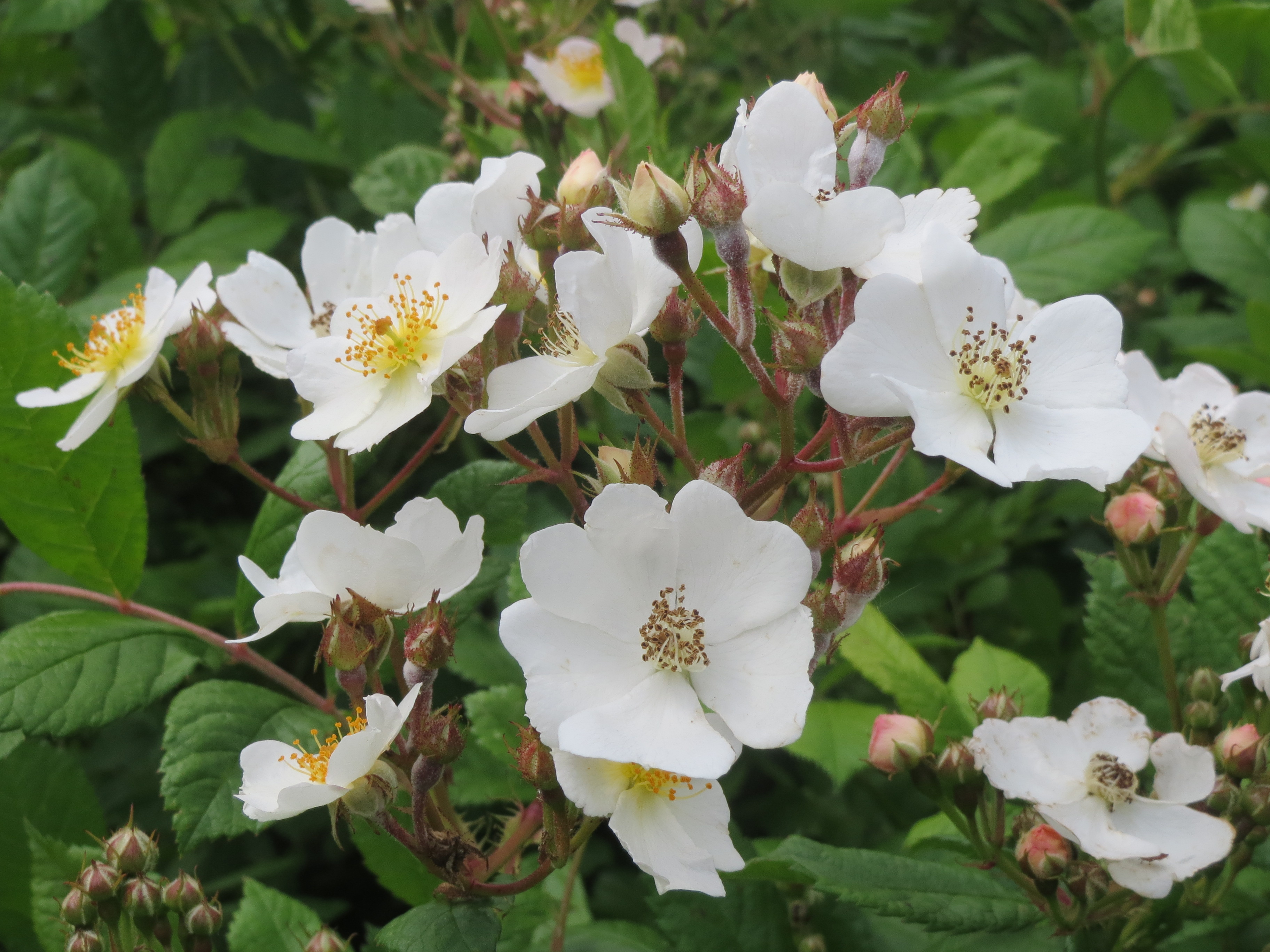 Vielblütige Rose (Rosa multiflora) bei Hockenheim